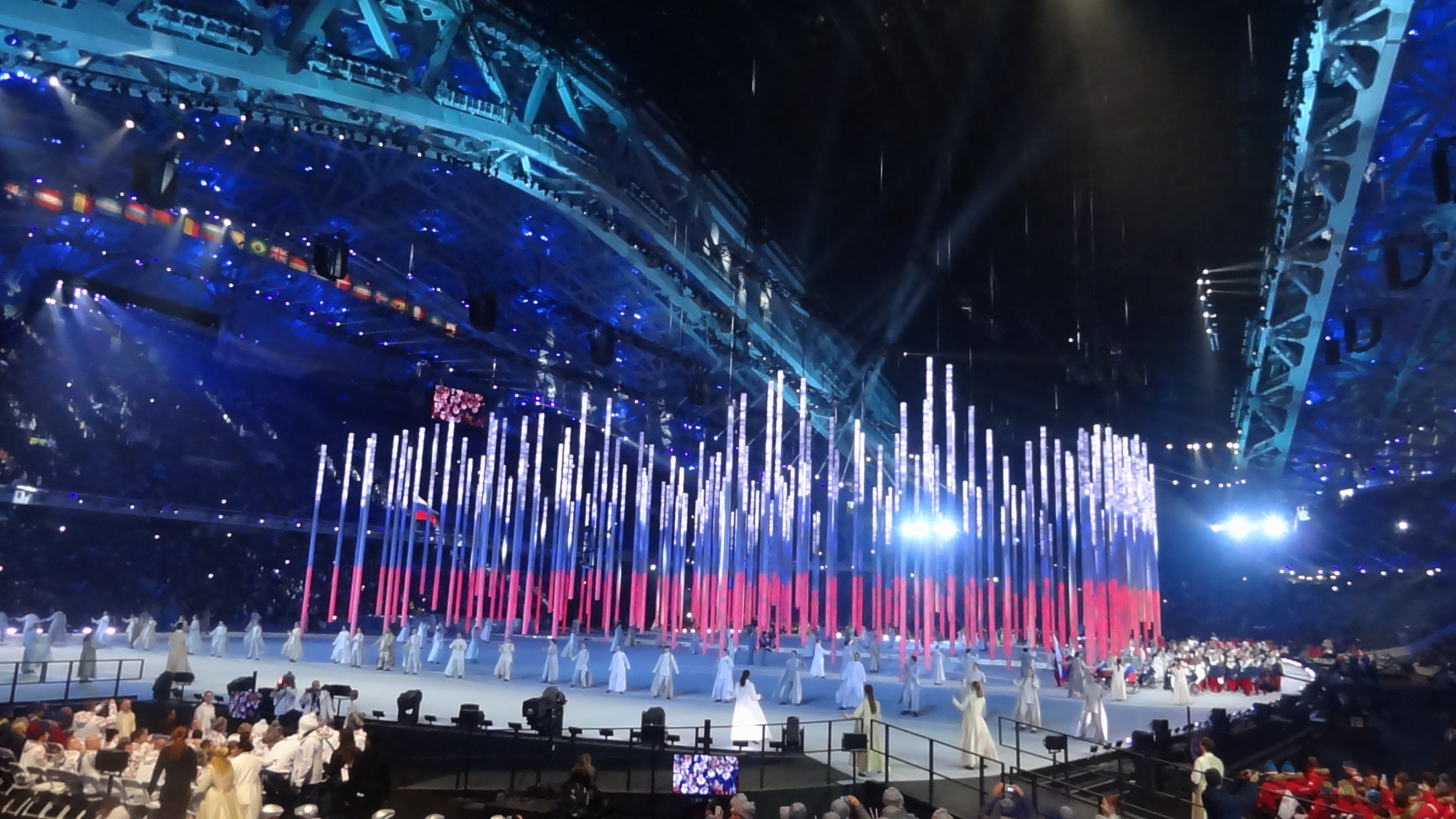 7 марта, на олимпийском стадионе "Фишт" состоялась торжественная церемония открытия зимних Паралимпийских игр-2014 в Сочи.